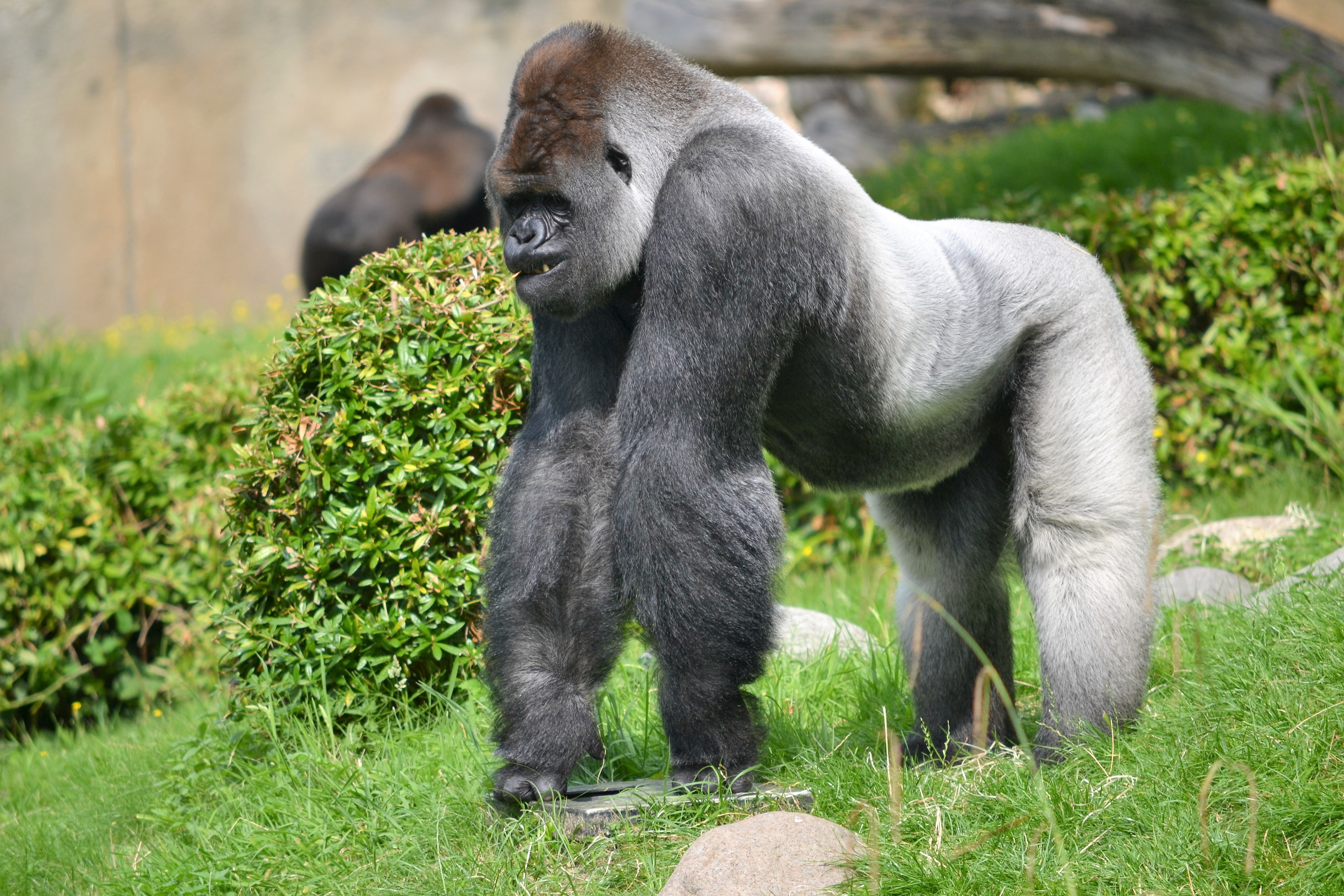 Deze foto is gemaakt tijdens een bezoek aan Diergaarde Blijdorp (Rotterdam, Nederland). This picture was taken during a visit to Rotterdam Zoo (Rotterdam, Netherlands).